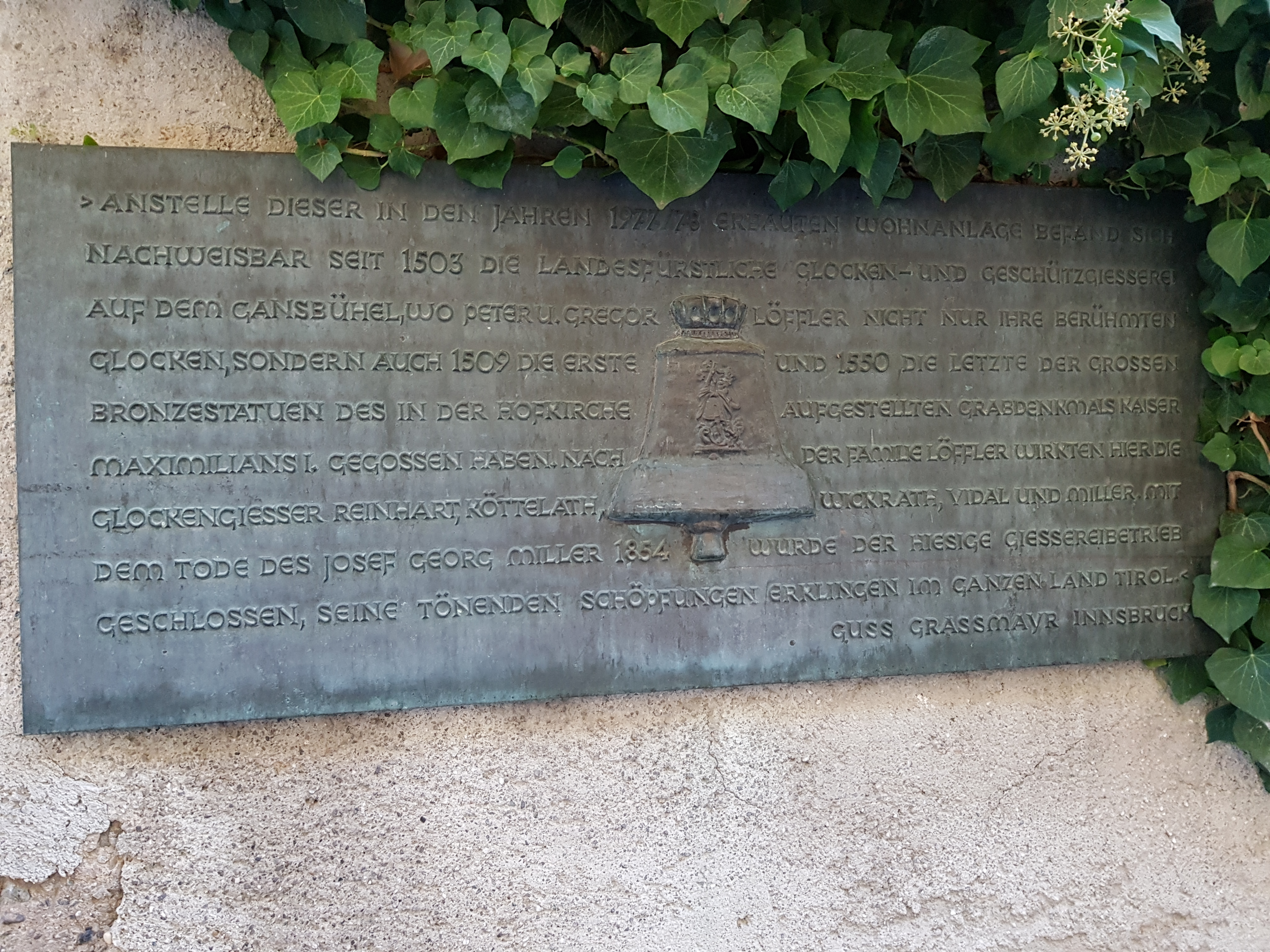 Mauer der landesfürstlichen Glocken- und Geschützgießerei This media shows the remarkable cultural object in the Austrian state of Tyrol listed by the Tyrolean Art Cadastre with the ID 116274. (on tirisMaps, pdf, more images on Commons, Wikidata)